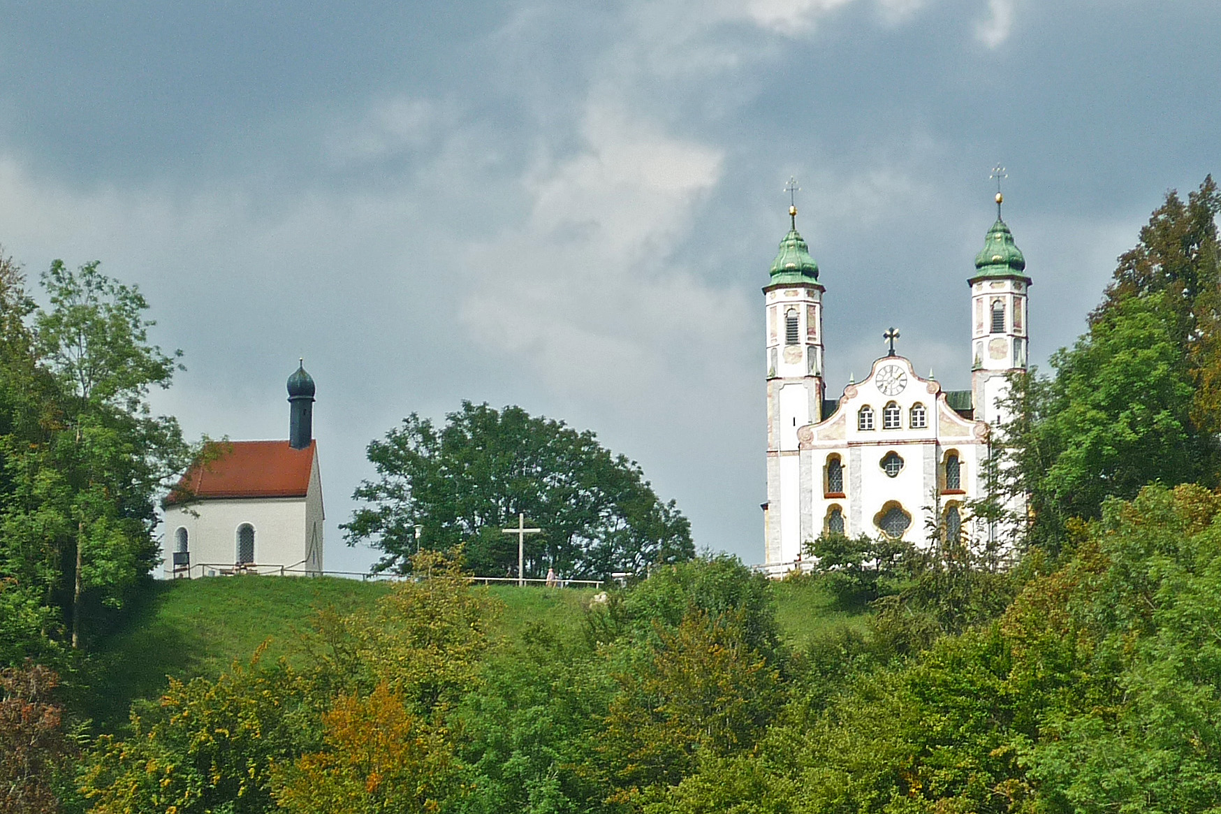 Kalvarienberg in Bad Tölz mit Kirche Hl. Kreuz und Kapelle St. LeonhardThis is a photograph of an architectural monument.